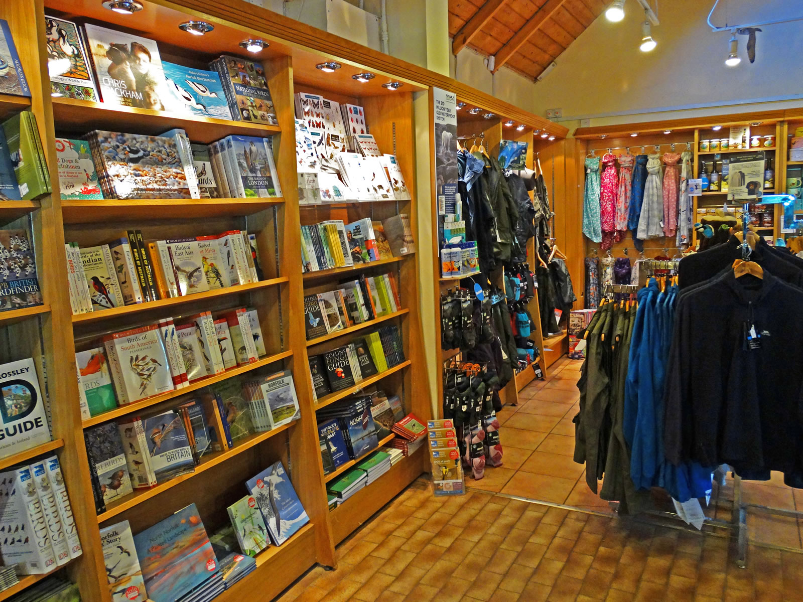 Boutique de souvenr